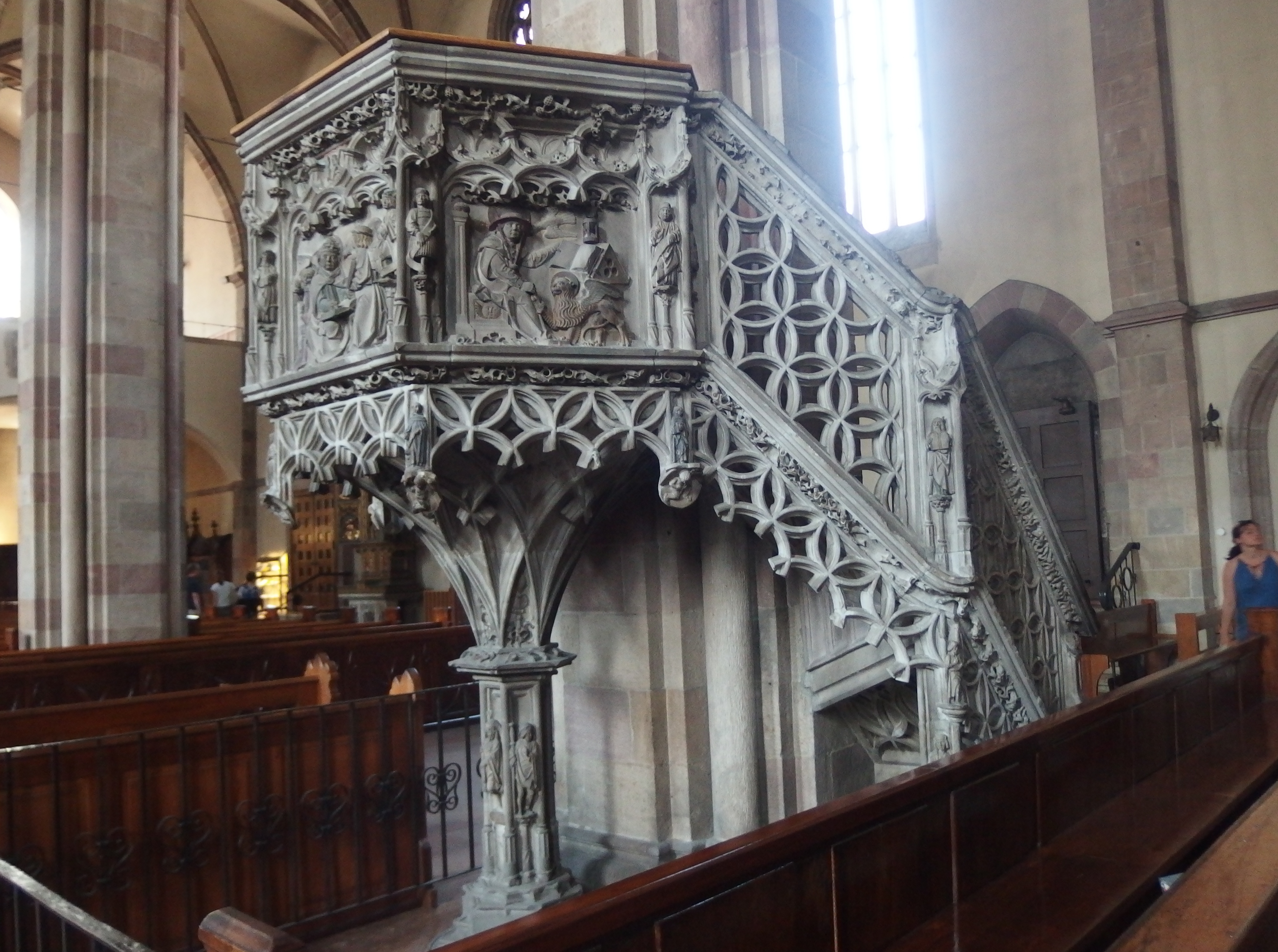 Bozen, Südtirol. Dom Maria Himmelfahrt.